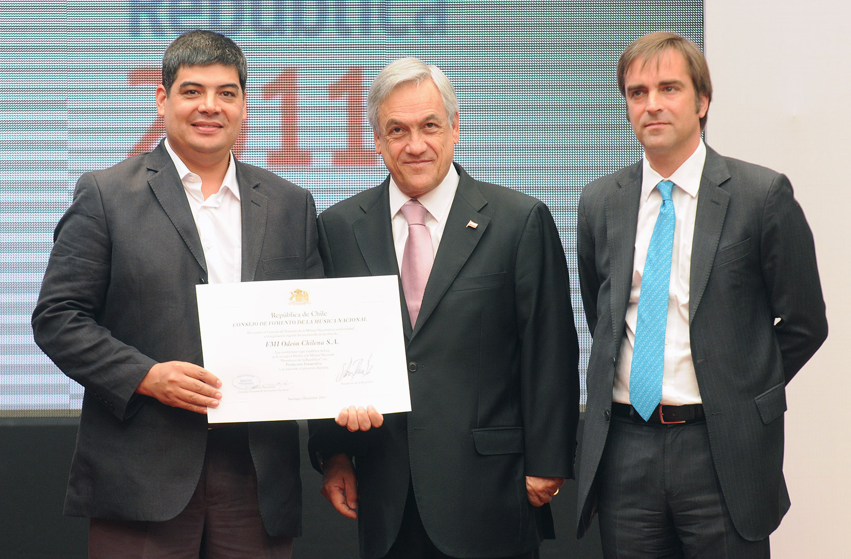 17-01-2012 Premio a la Música